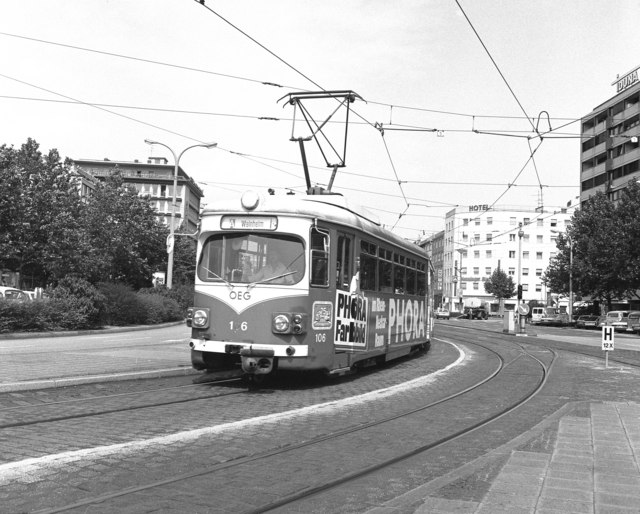 OEG tram in Mannheim